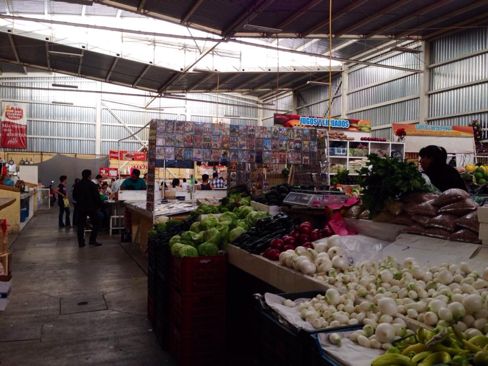 El comercio de diversos productos comestibles y de primera necesidad se realiza en los alrededores del Mercado Municipal de Uriangato "José Dionisio Vallejo"